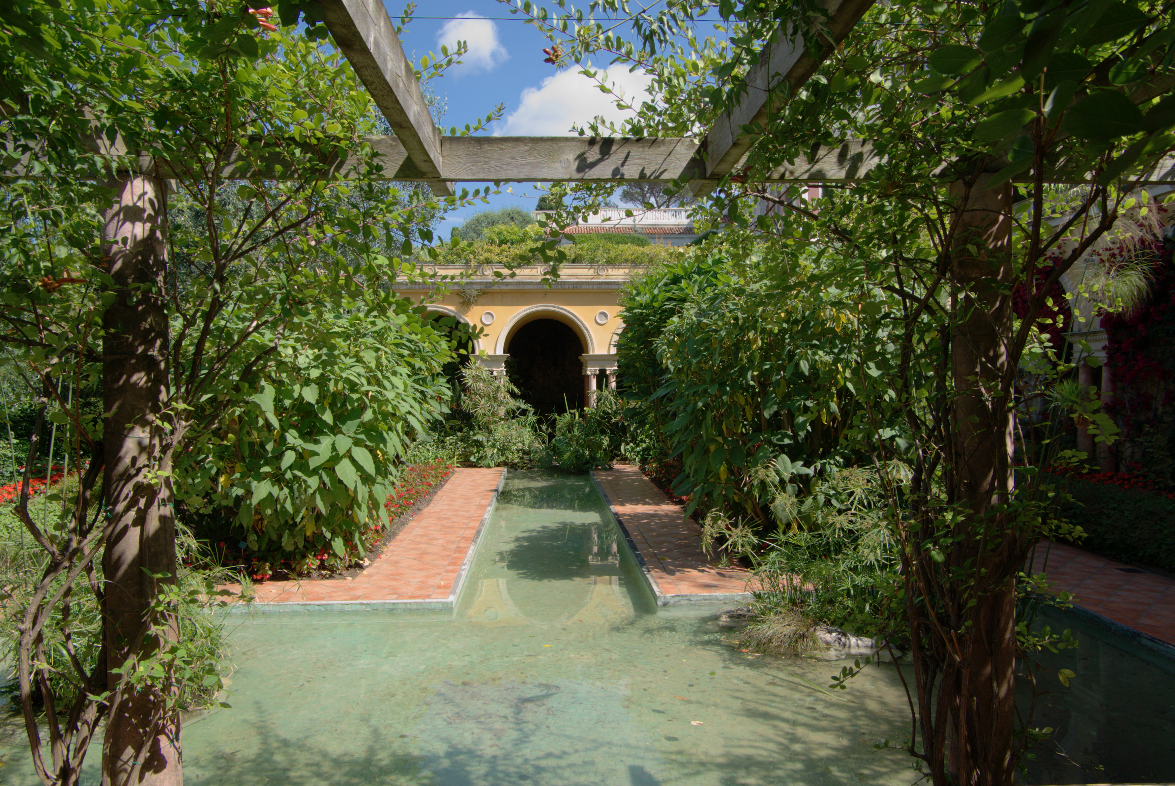 Villa Ephrussi de Rothschild, Spanischer Garten